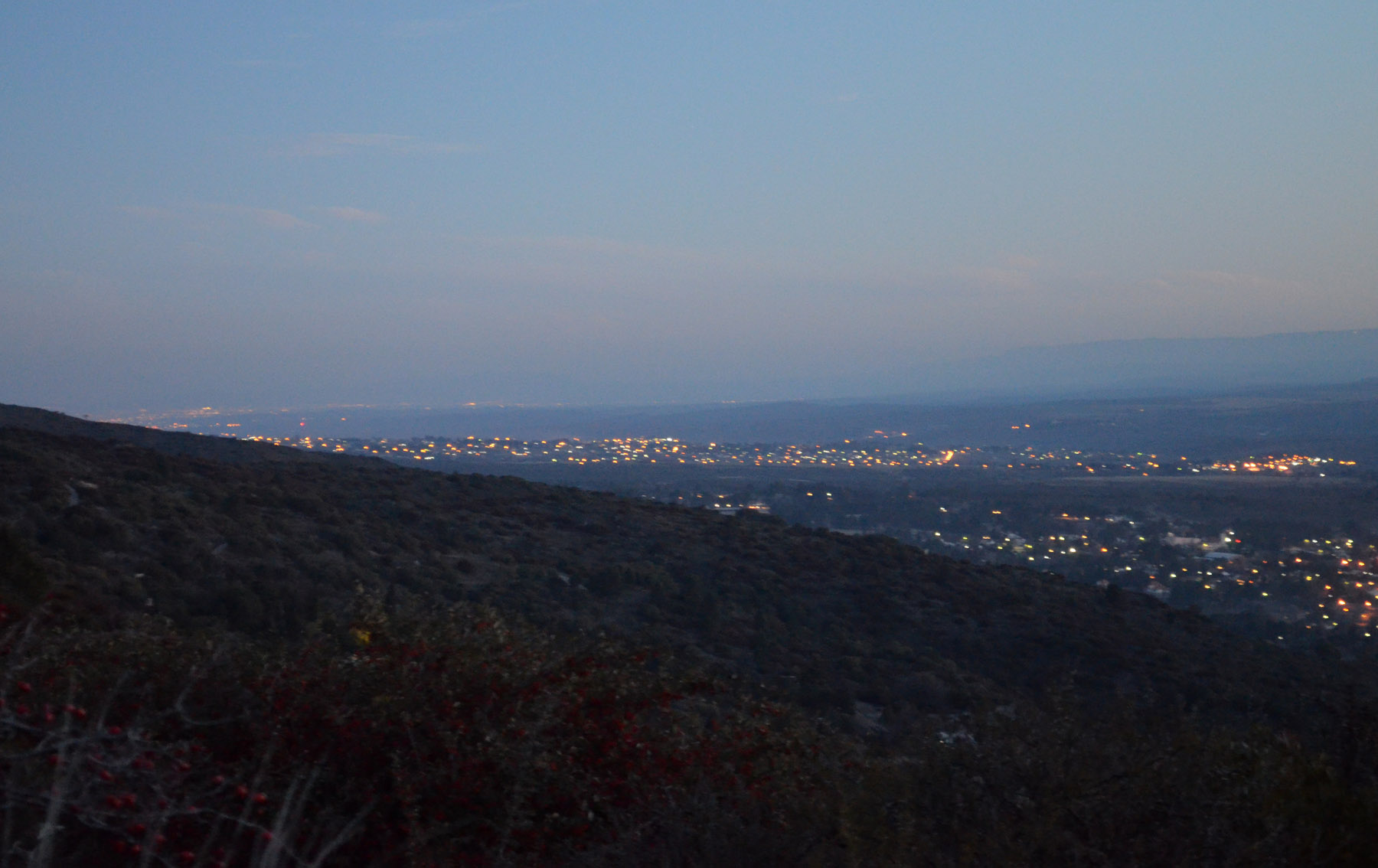 Valle de Punilla visto al atardecer desde el norte.